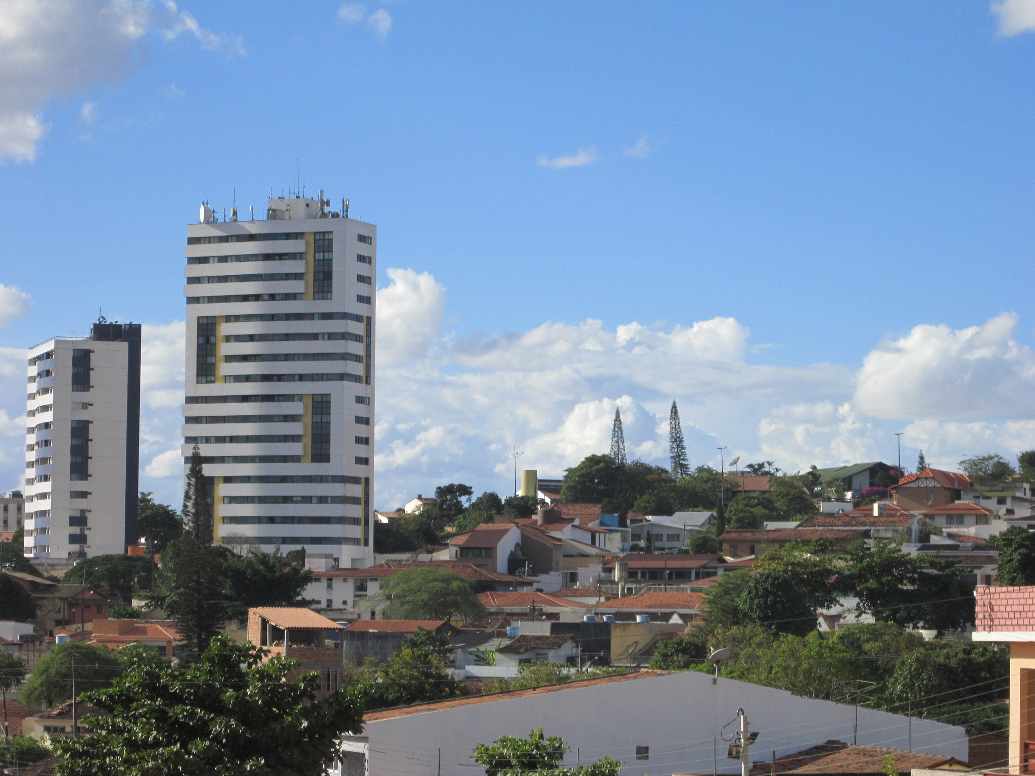 Garanhuns - Pernambuco - Brasil